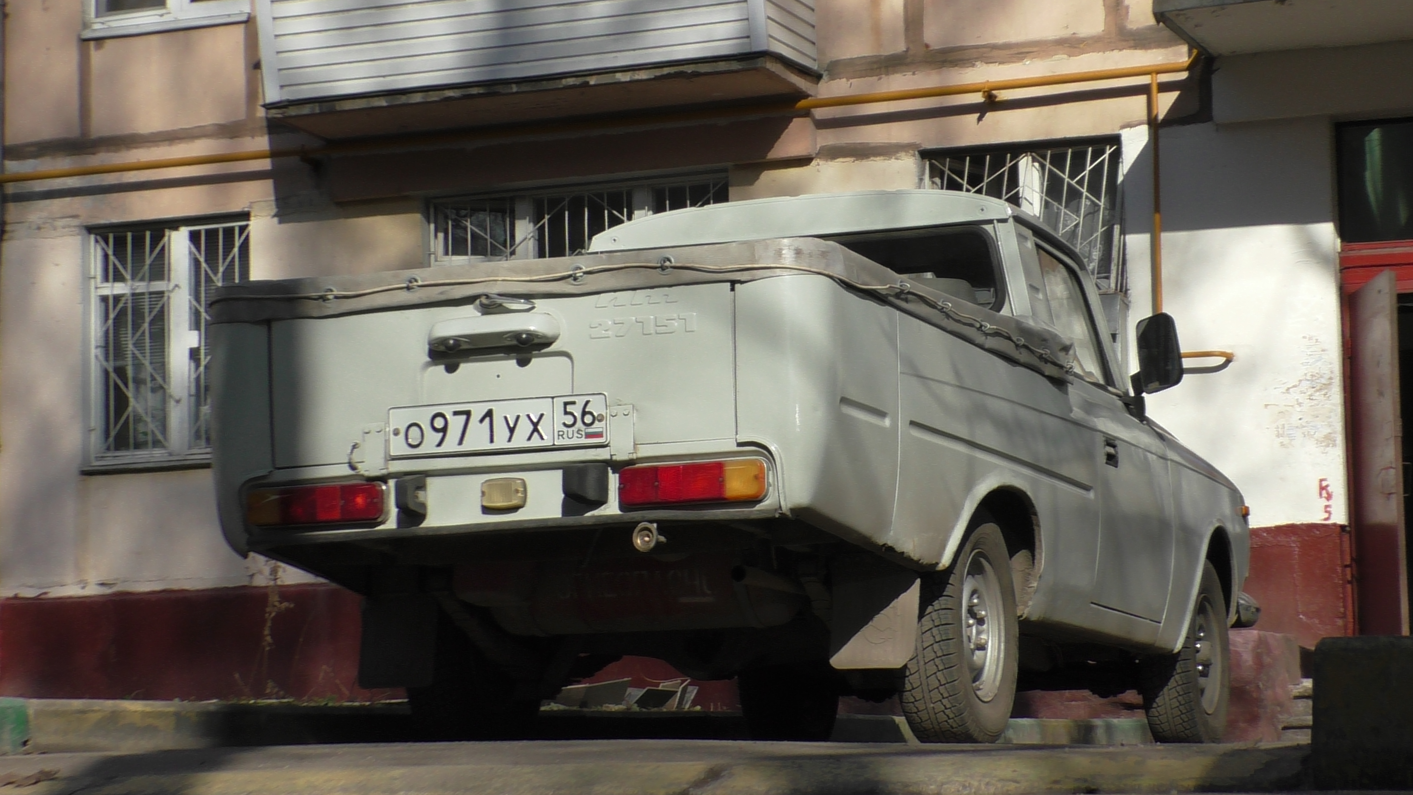 О971УХ56